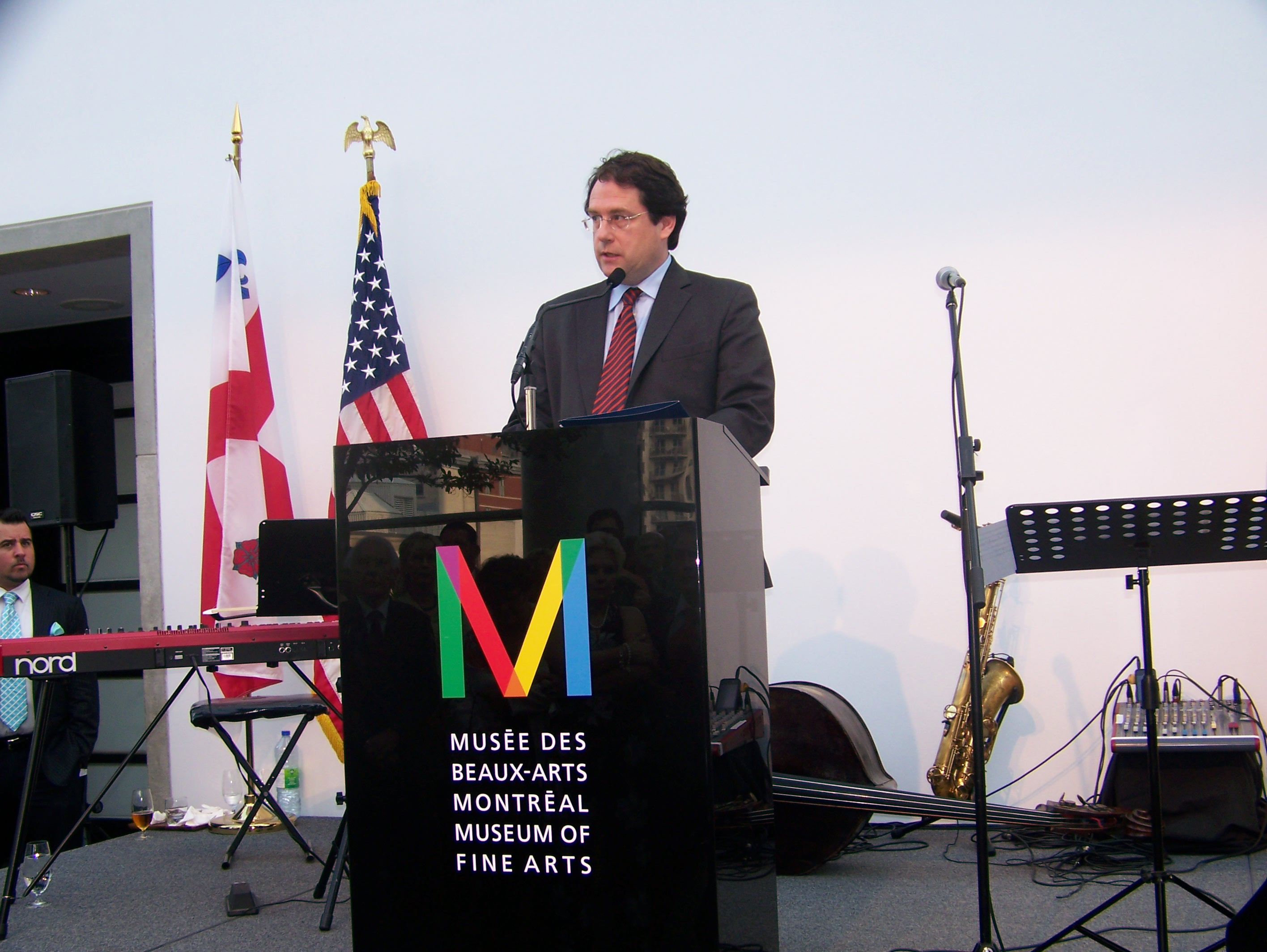 Bernard Drainville, ministre responsable des Institutions démocratiques et de la Participation citoyenne du Québec, lors d'une réception à l'occasion de la Fête de l'indépendance des États-Unis, au Musée des beaux-arts de Montréal